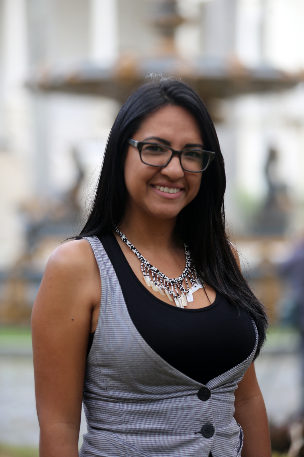 Gabriela Simoza, Asamblea Nacional 2017